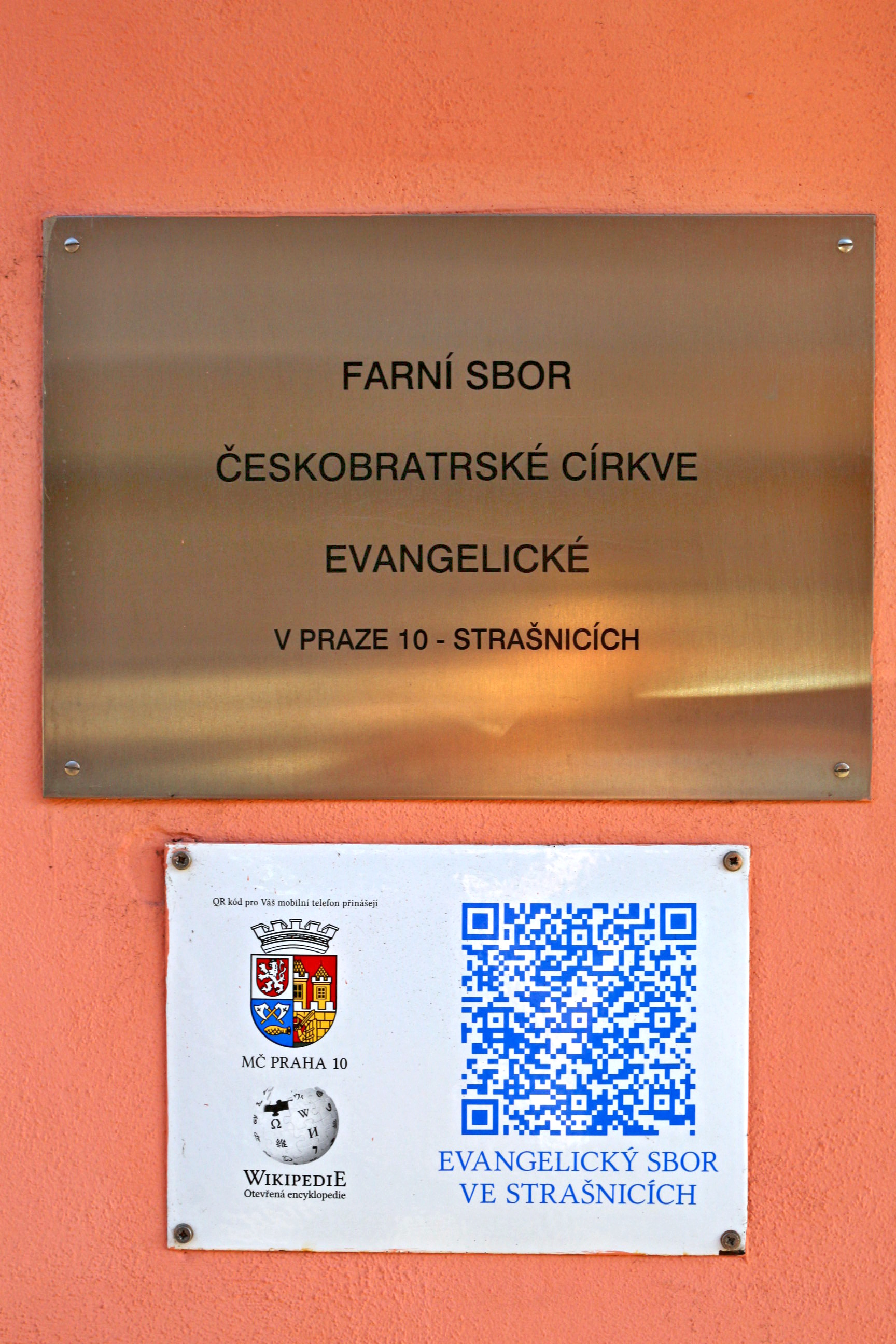 Farní sbor ČCE v Praze 10-Strašnicích